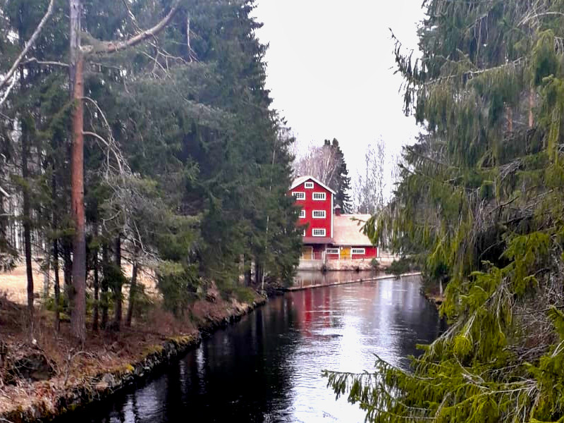 Канал между озерами Пюхаярви и Оривеси